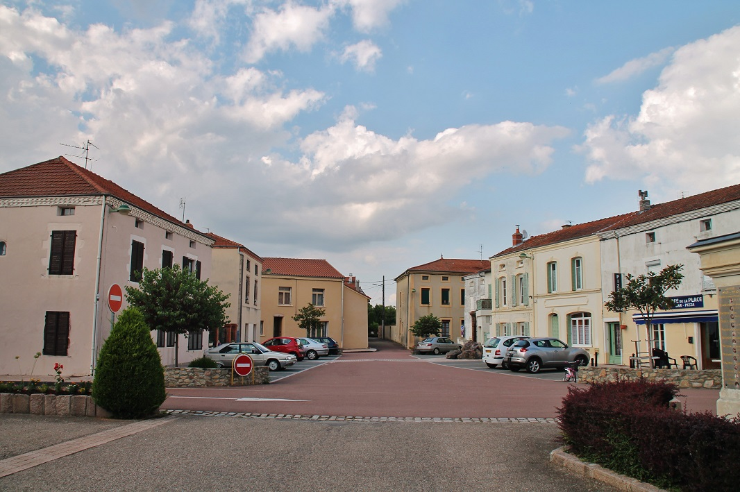 La Place du Village